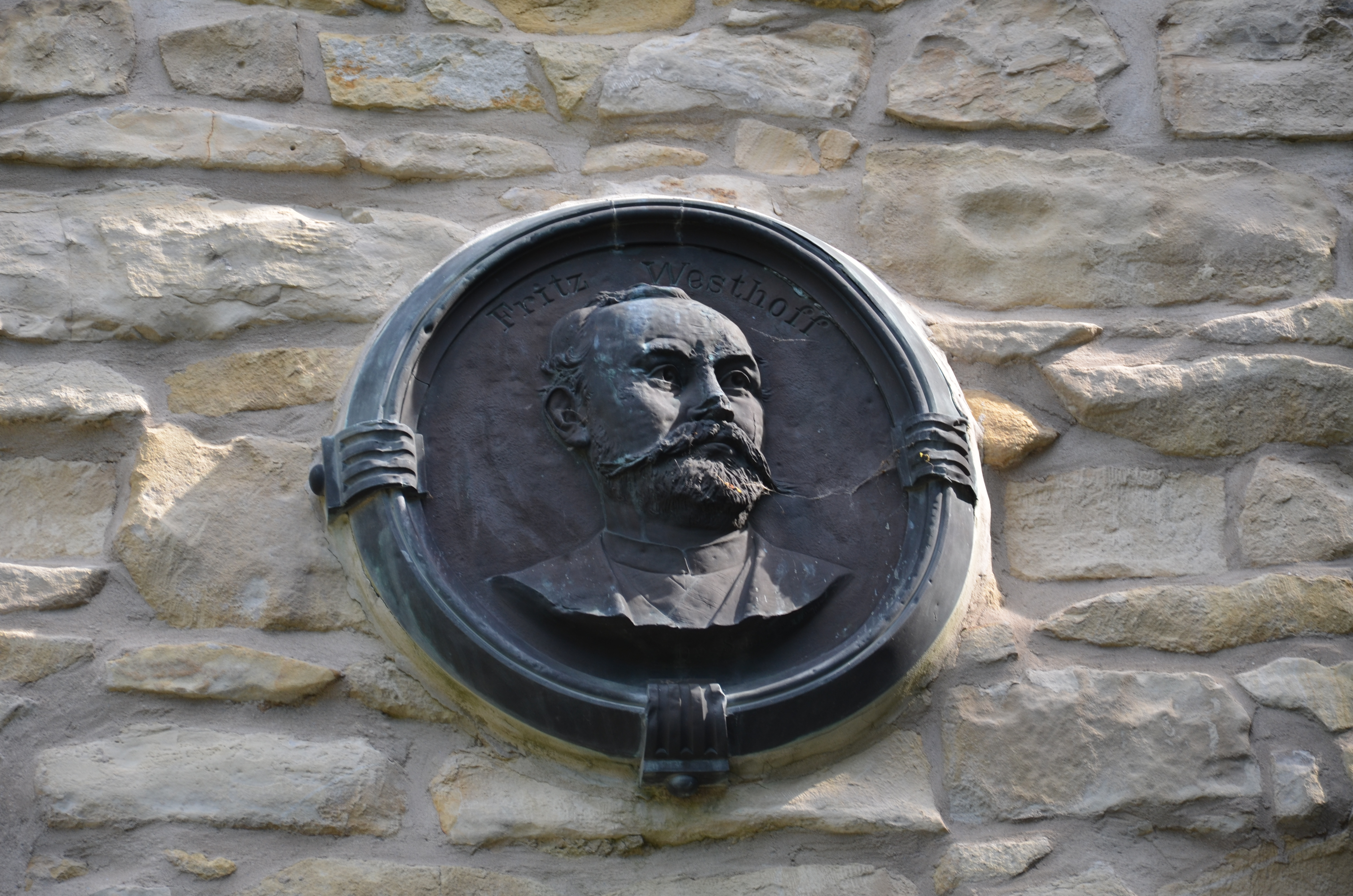 Longinusturm auf dem Westerberg in den Baumbergen im Münsterland Detail der Plakette mit dem Hinweis auf Doktor Longinus alias Friedrich Westhoff